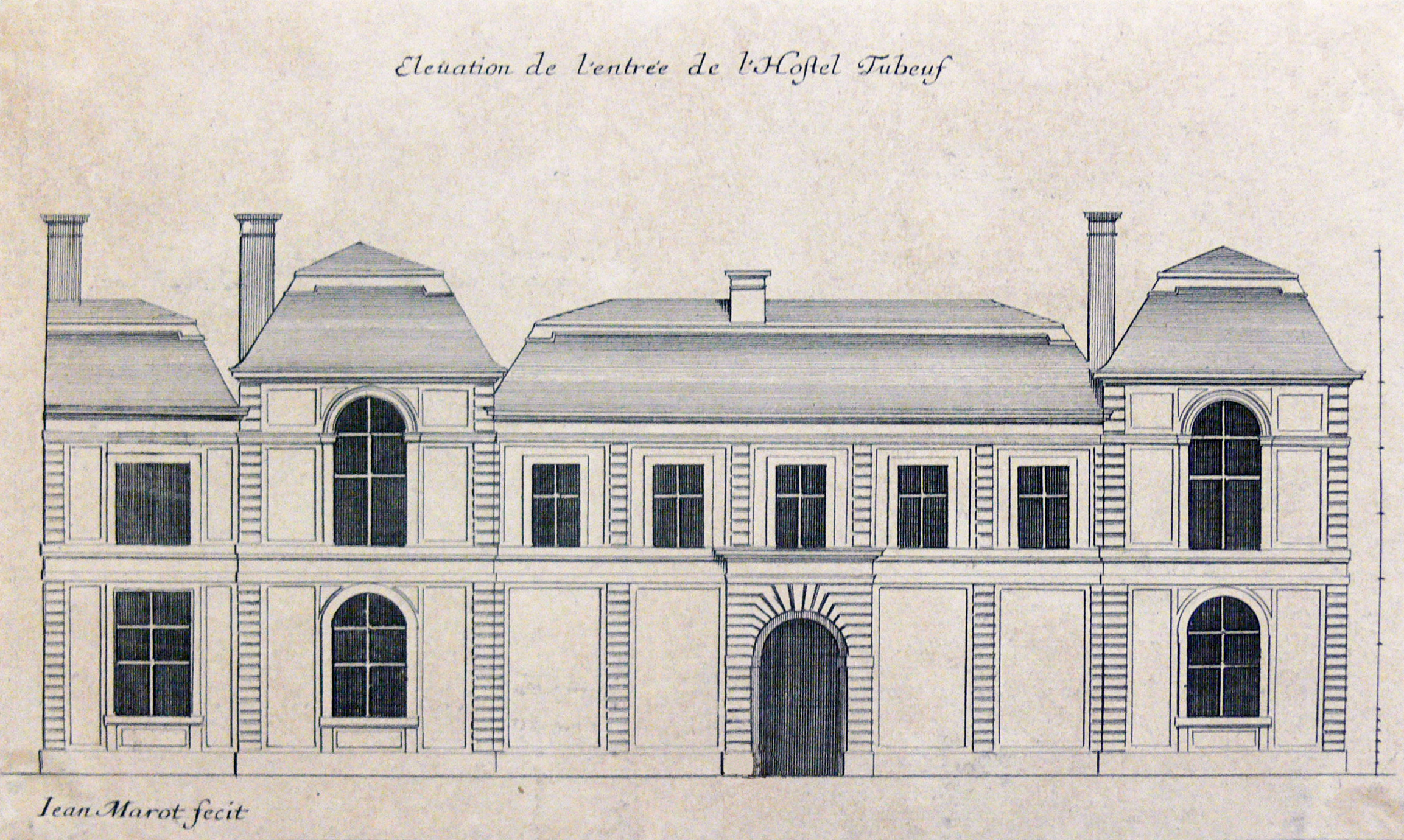 Hotel Tubeuf ou Colbert de Torcy (rue Vivienne), estampe de Jean Marot